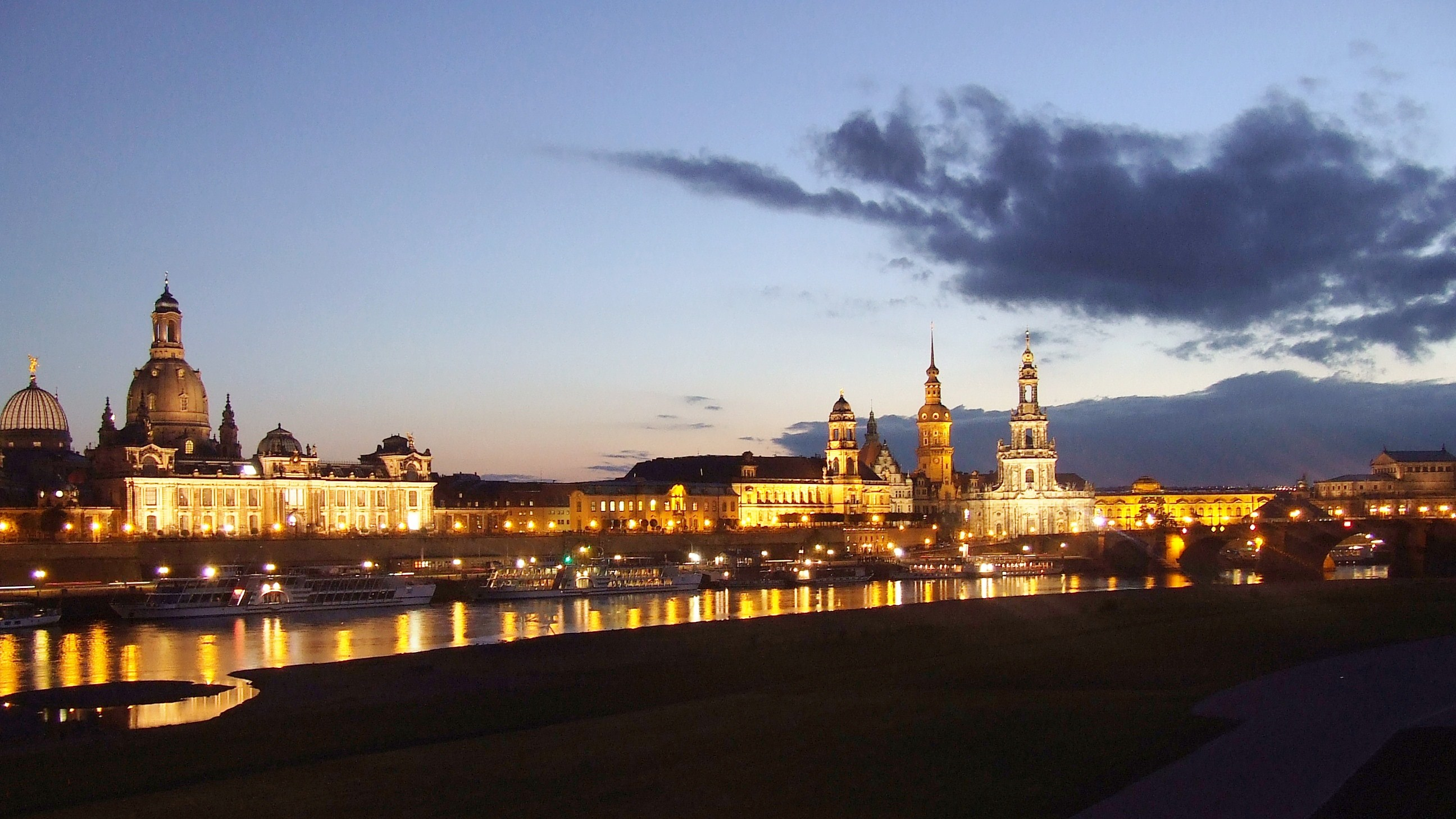 Dresdner Elbflorenz bei Dämmerung